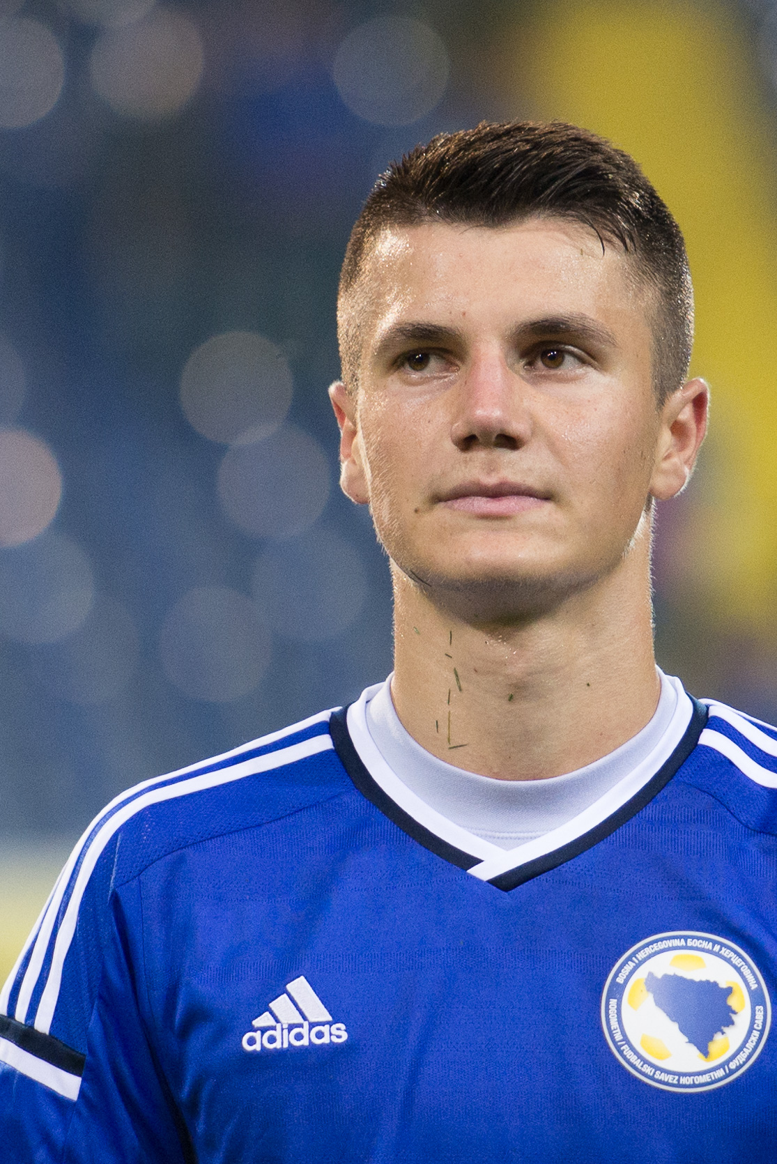 Fußball U21 EM-Qualifikation Österreich gegen Bosnien und Herzegowina St. Pölten, 5. September 2014 Armer Gojak